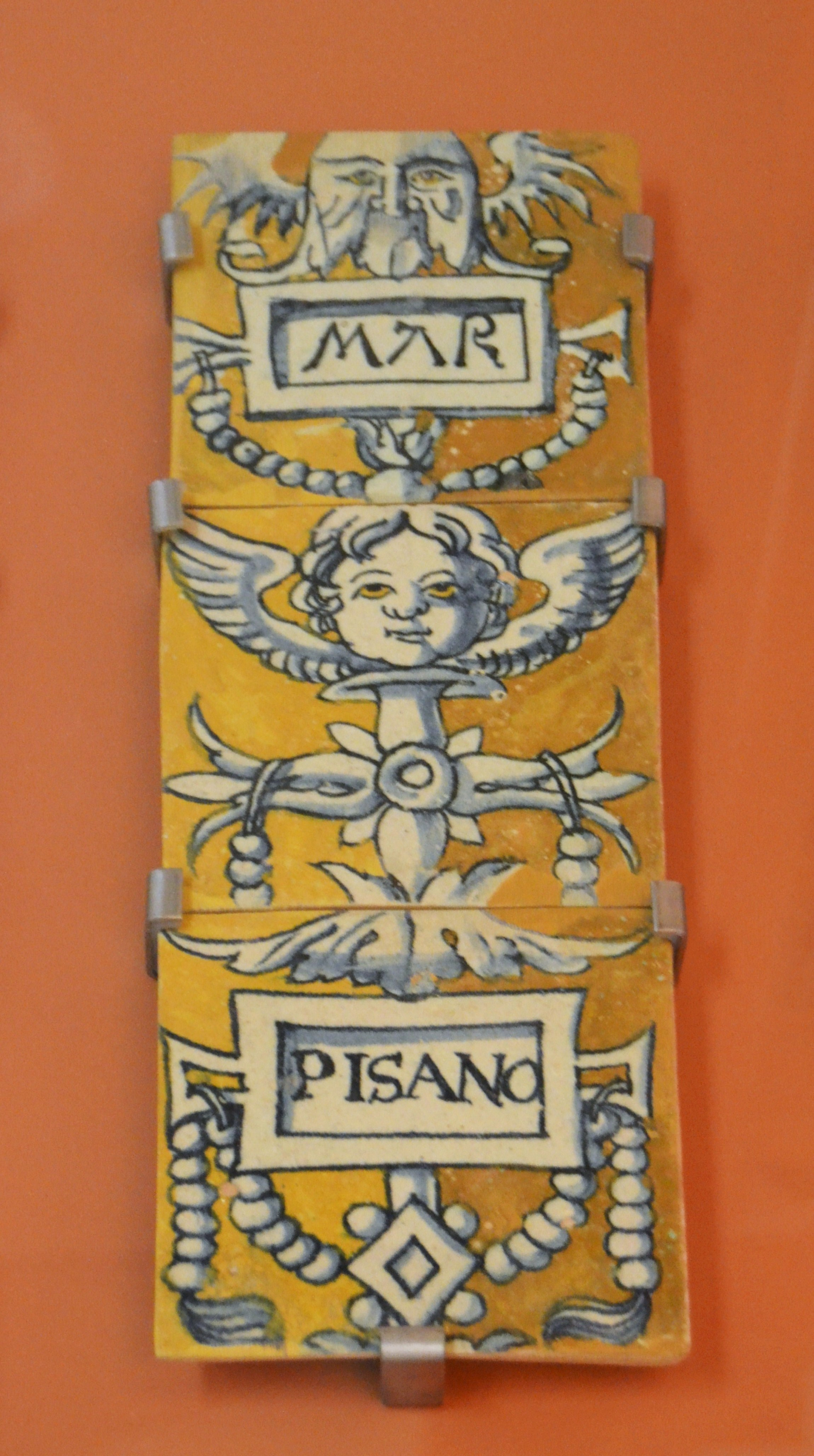 Taulell policrom atribuït a Niculoso Pisano. Procedeix del palau del Comte del Real de València. Datat el 1511. Museu de Nacional de Ceràmica de València.